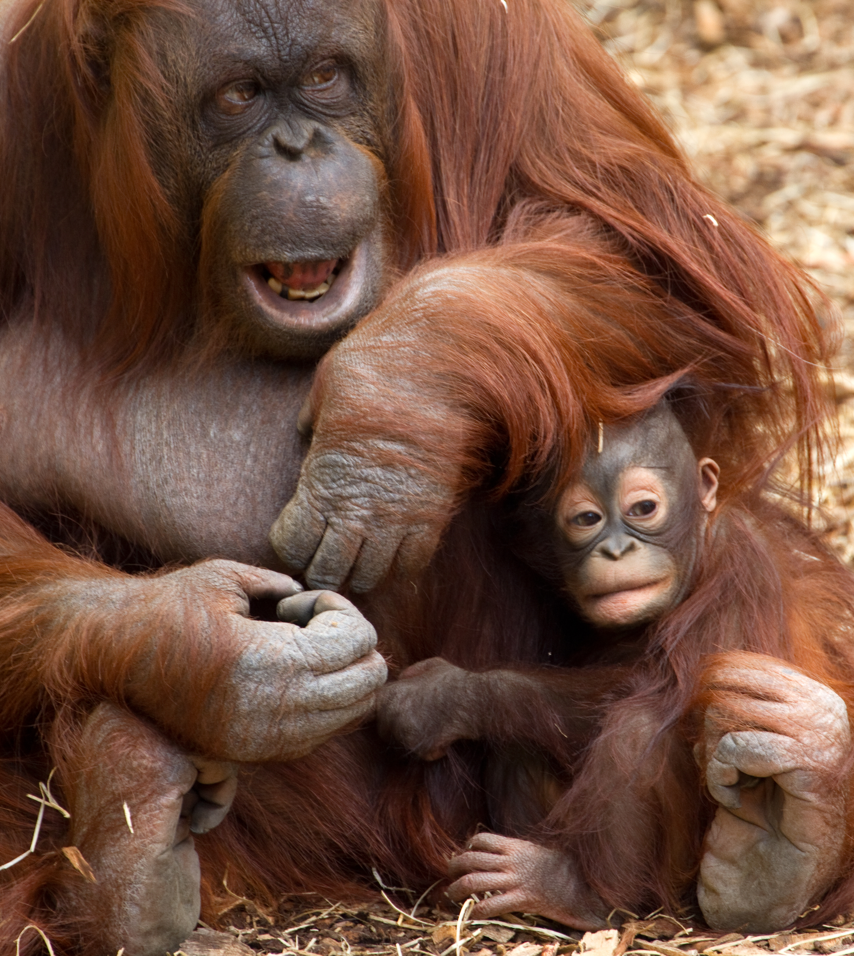 Baby Orangutan